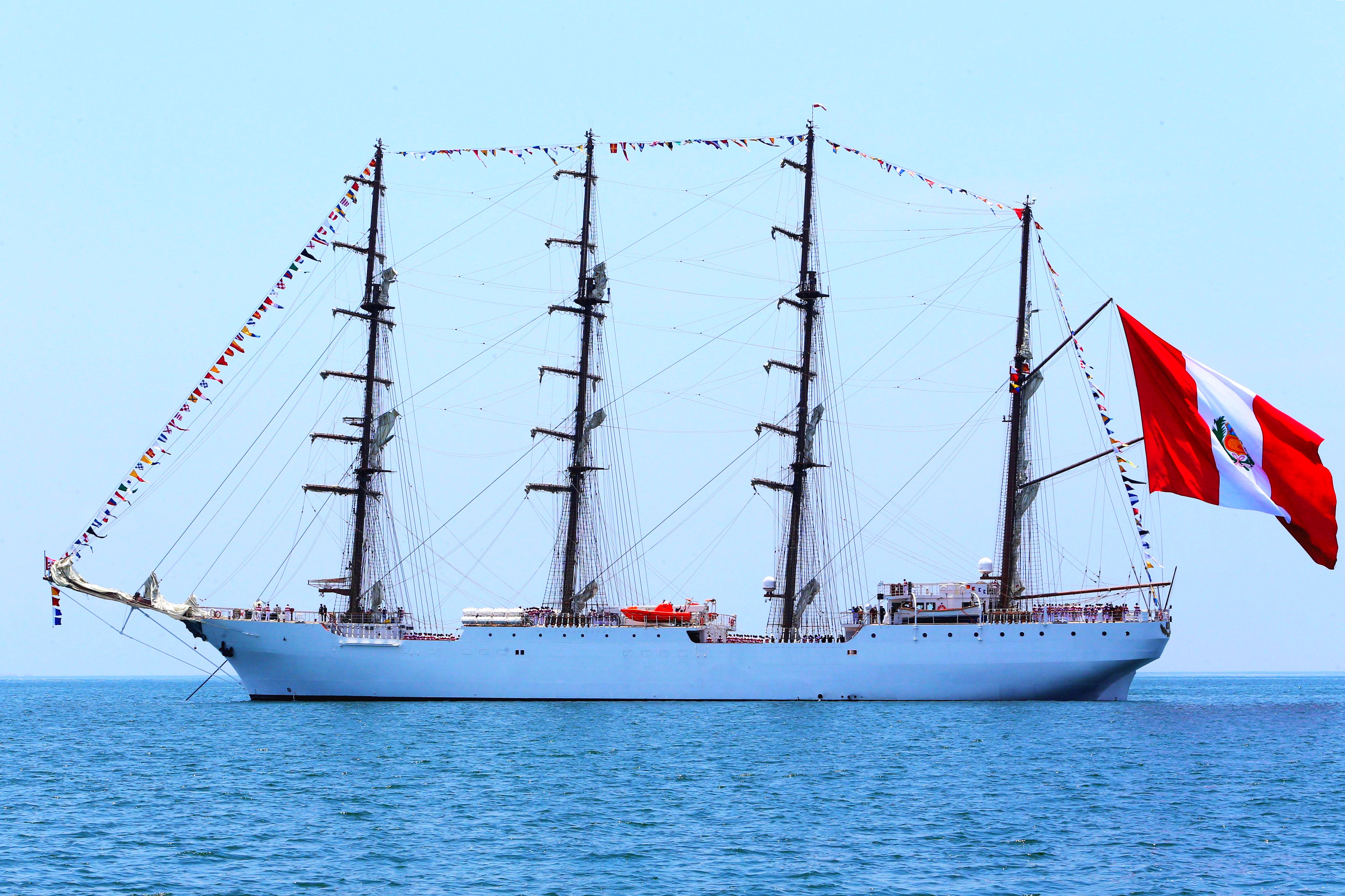 EL BUQUE ESCUELA A VELA B.A.P UNIÓN ARRIBÓ AL PUERTO DEL CALLAO AL FINALIZAR SU VIAJE DE INSTRUCCIÓN INAUGURAL